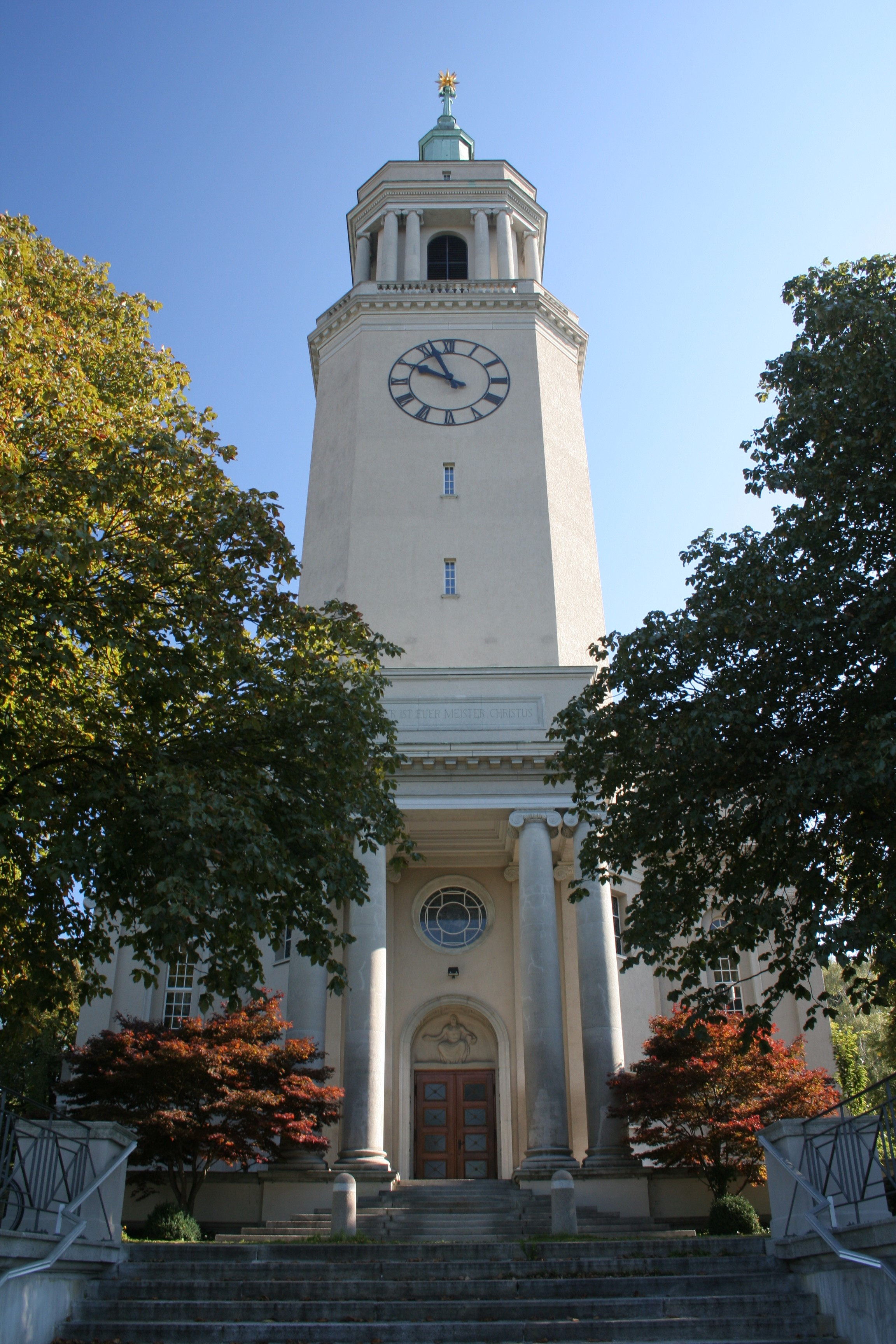 Grosse Kirche Fluntern, Zürich, SchweizDie evangelisch-reformierte Kirche wurde 1920 von Karl Moser erbaut